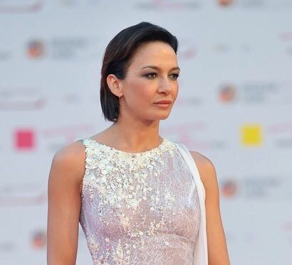 Giovanna Di Rauso al Roma Fiction Fest 2014